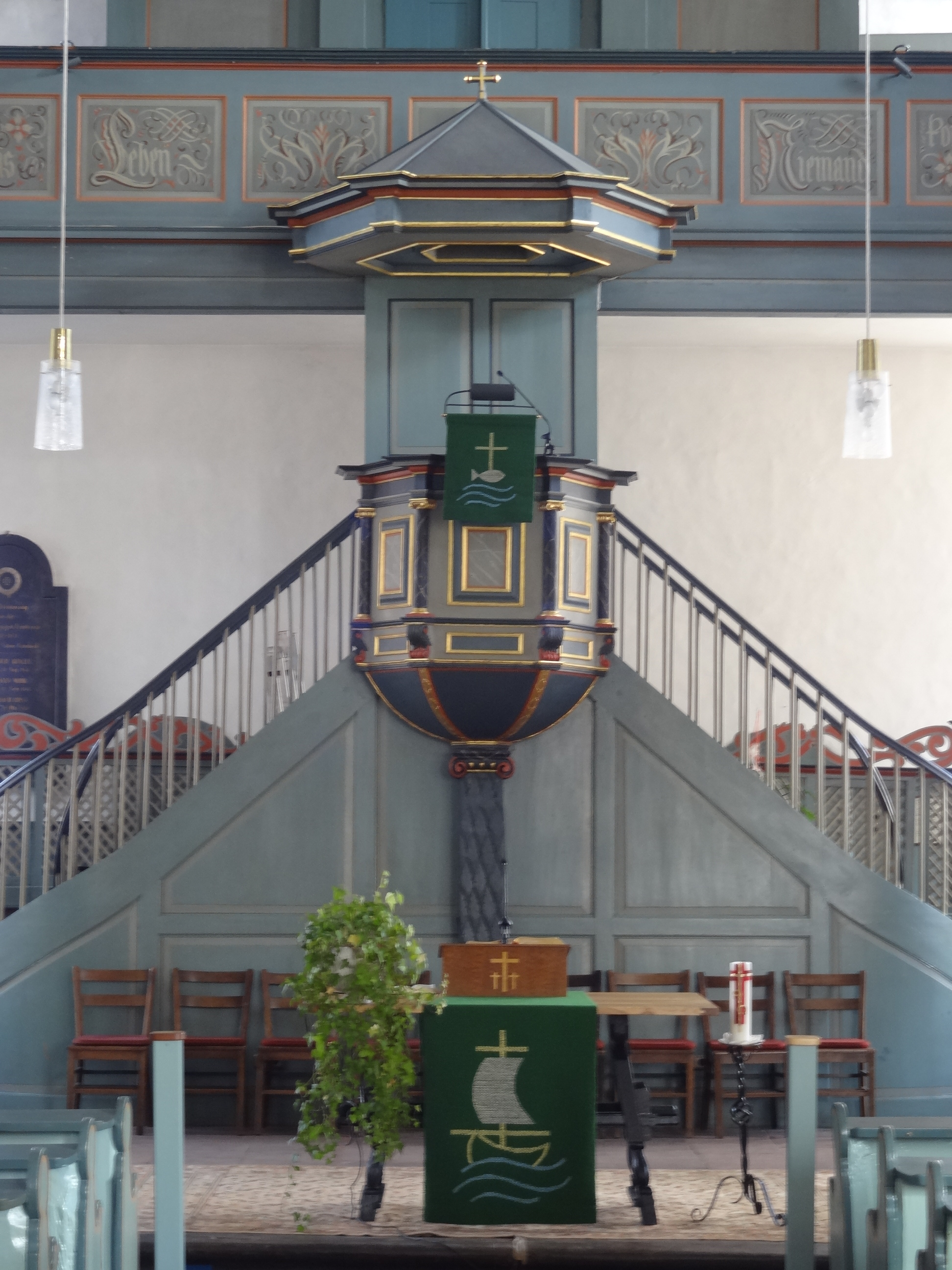 Evangelische Pfarrkirche (Gambach)